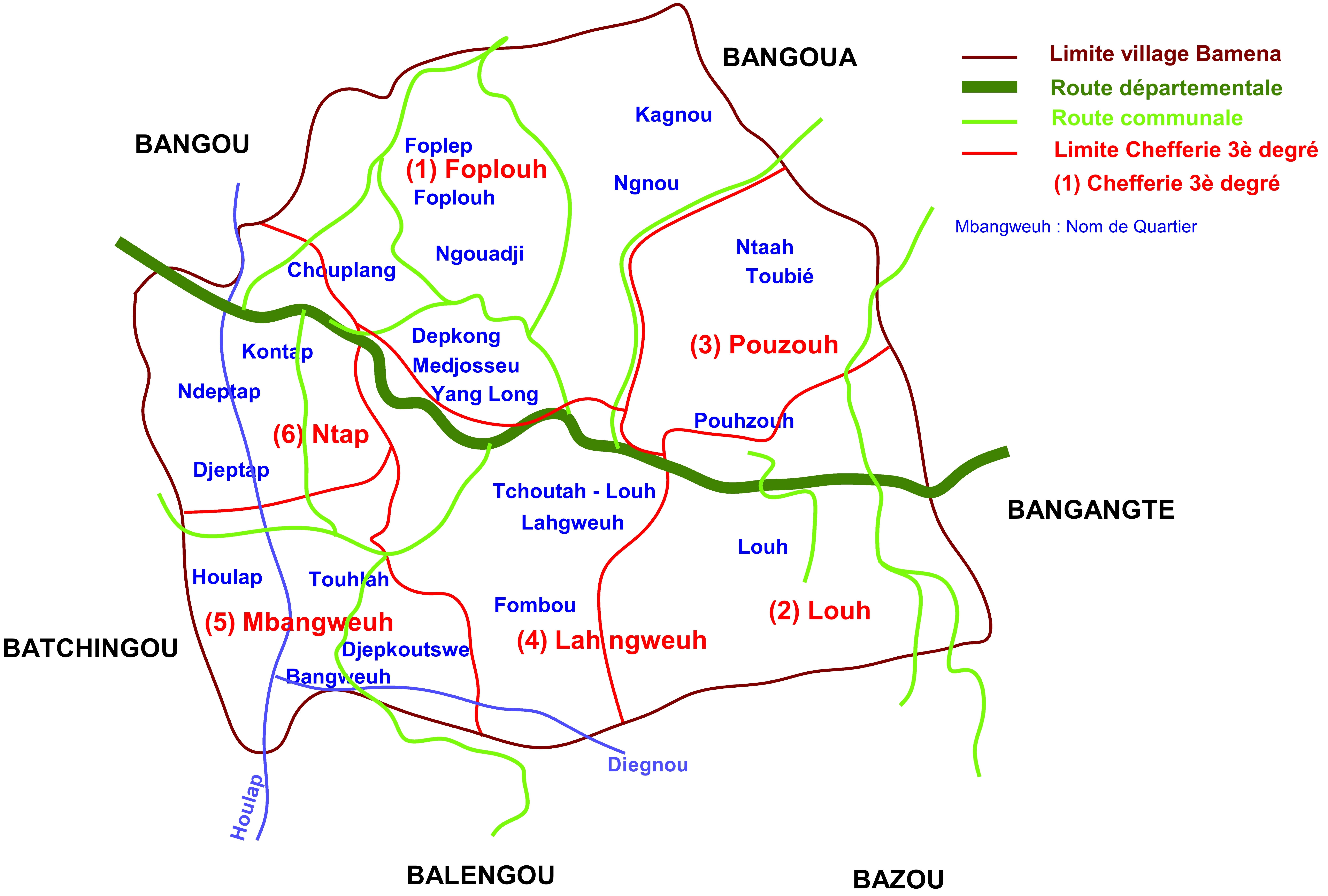 Dessiné sur DesignCad